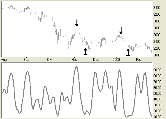 Demo illustratie handelssysteem met twee short trades.